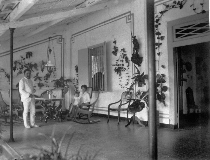 Foto. Situasi di suatu rumah besar era kolonial. Dinding di pendapa dihiasi dengan berbagai jenis tanaman, di antaranya anggrek.